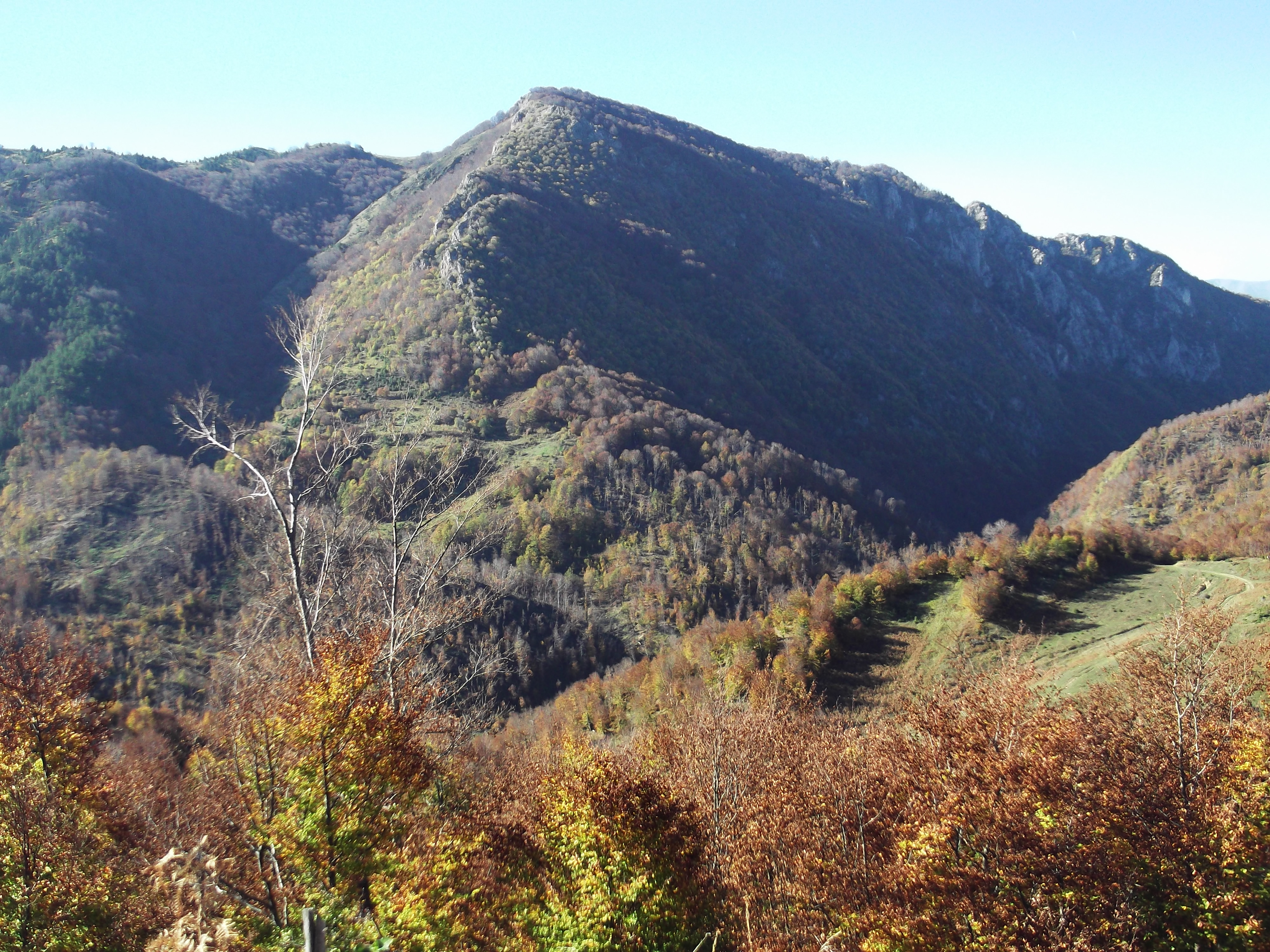 Guri i Nikes, Pogradec